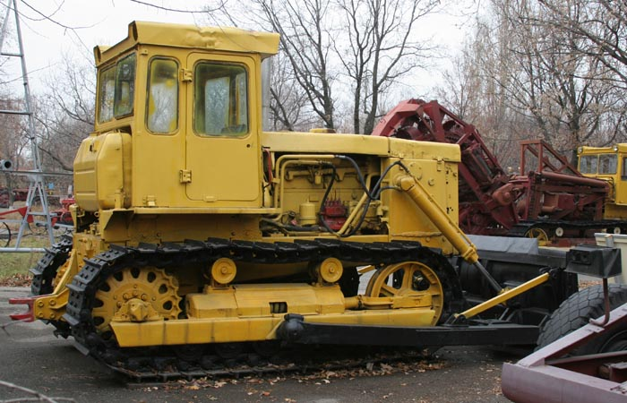 Трактор Т-130 в Саратове на Соколовой горе